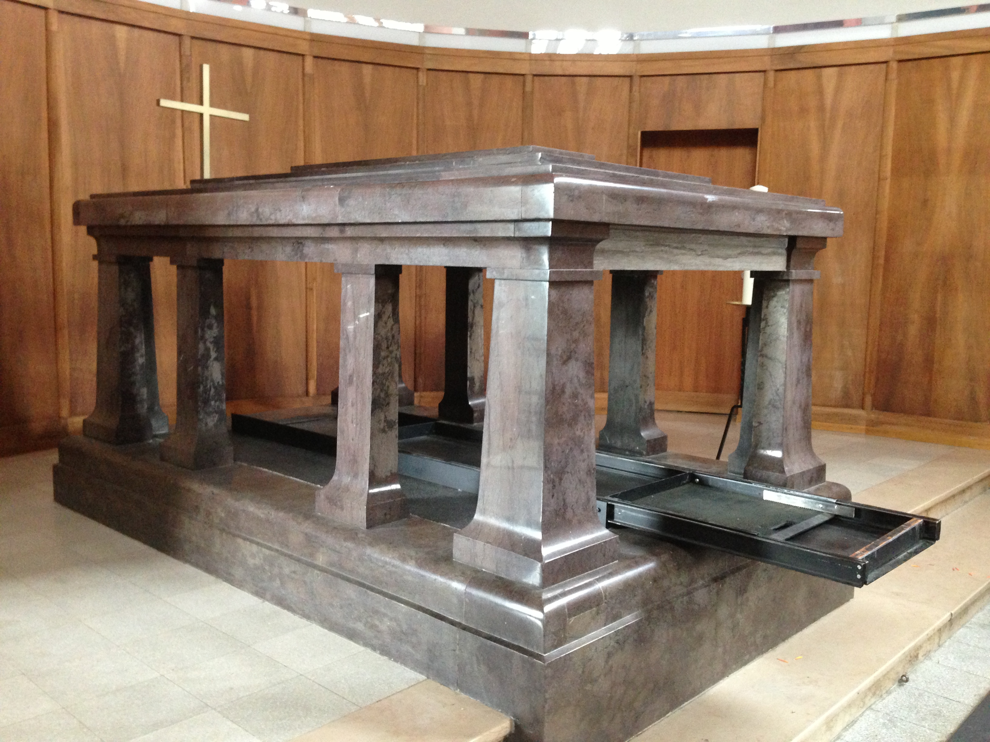 Catafalque dans la chapelle de l’Ange de la Consolation, réalisée en 1902 par Gustave Brocher (1851-1918)